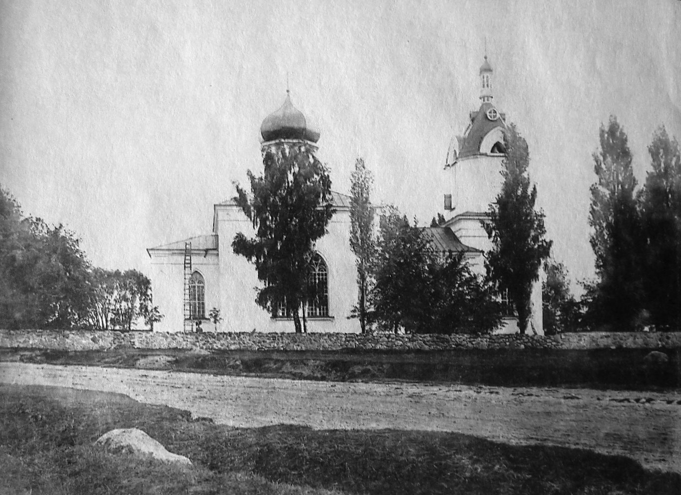 Беларуская (тарашкевіца): Алекшыцы (Alekšycy). Царква-мураўёўка